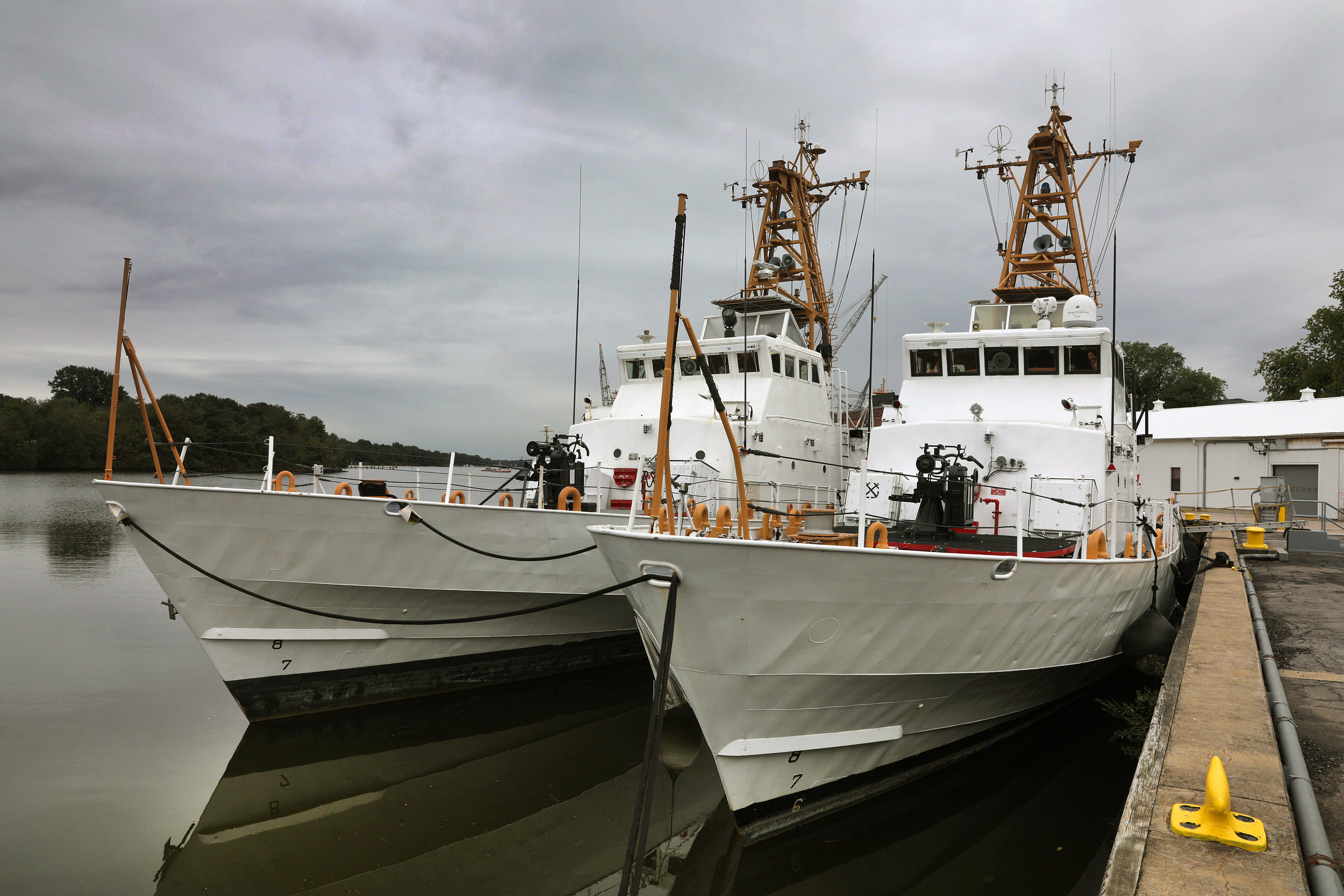 США торжественно передали Украине два патрульных катера класса "Айленд". Патрульные катера класса "Island" строились для Береговой охраны США в период с 1985 по 1992 годы. Всего было построено 49 катеров этого класса. В 2014 году их начали выводить из состава Береговой охраны США в связи с заменой на строящиеся новые сторожевые катера типа "Sentinel", однако в настоящее время 12 катеров все еще эксплуатируются. Выведенные из состава Береговой охраны и законсервированные катера США постепенно передают своим союзникам. Согласно данным из открытых источников, в настоящее время без учета передаваемых Украине 2 катеров у американской стороны остаются в наличии около 30 "Айлендов".